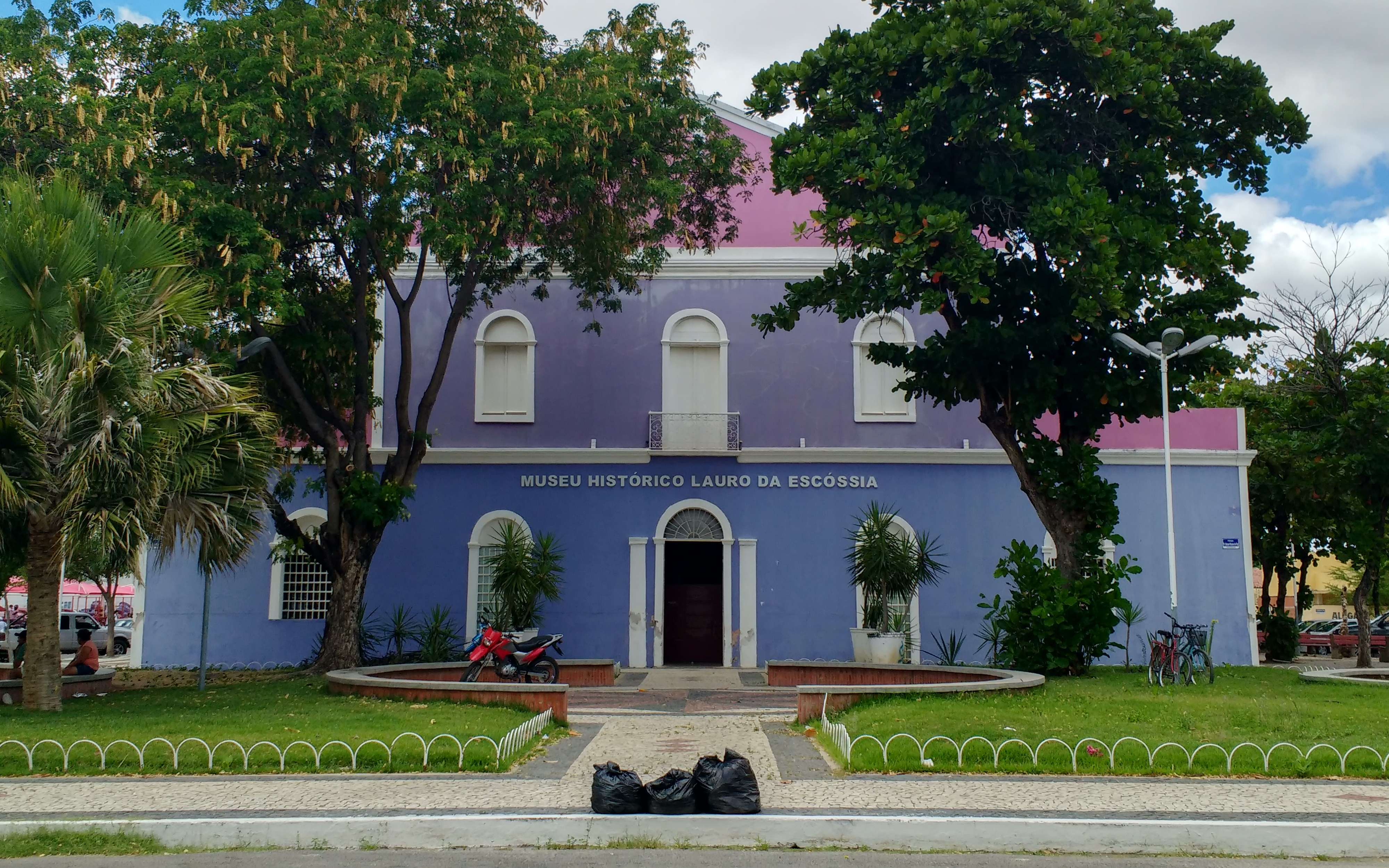 Museu Municipal Jornalista Lauro da Escóssia em Mossoró, Rio Grande do Norte (Brasil)